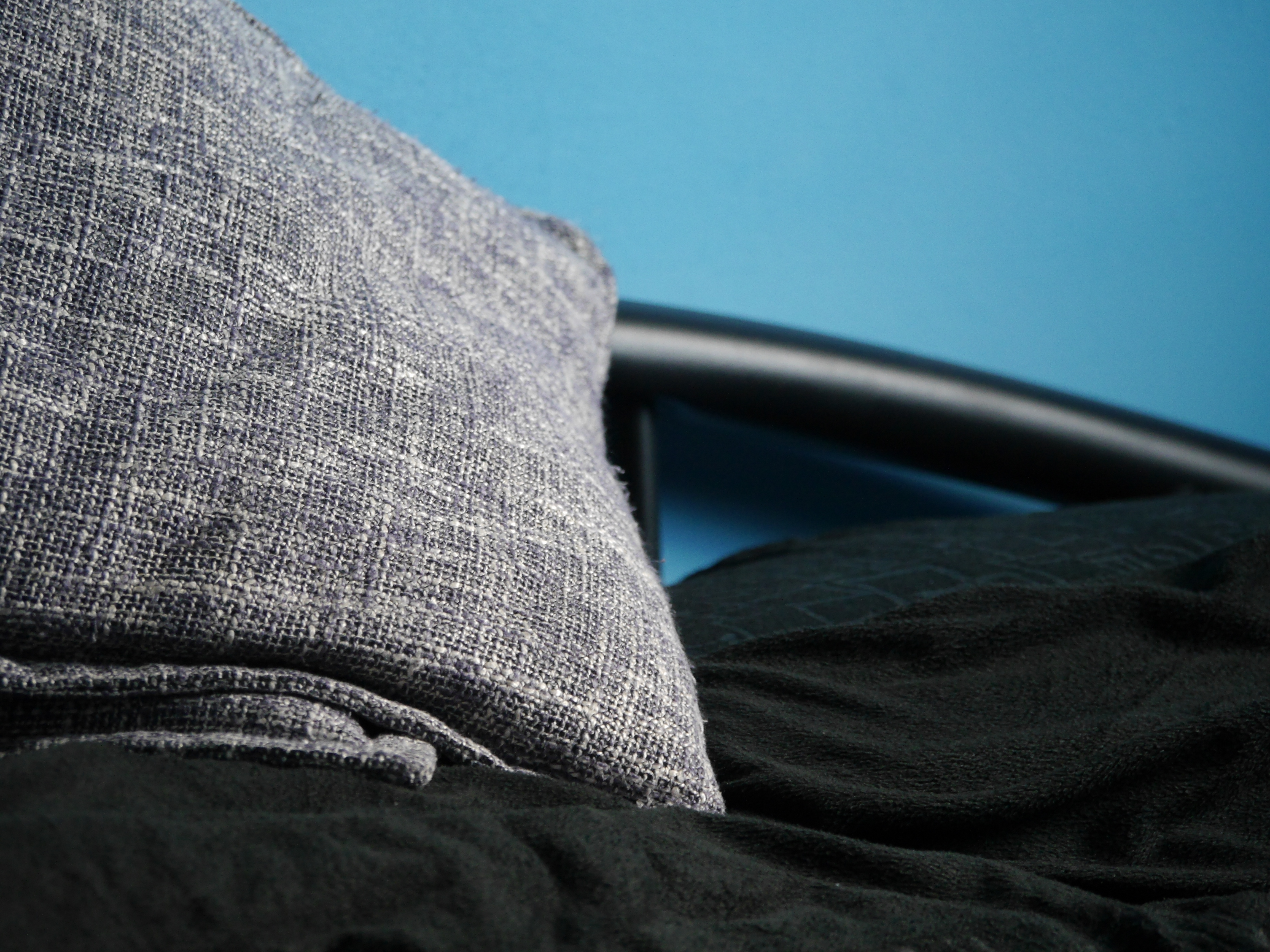 This photo was taken with Panasonic Lumix DMC-G6 camera, thanks to Panasonic. You can see all photographs in category: Taken with Panasonic Lumix DMC-G6.